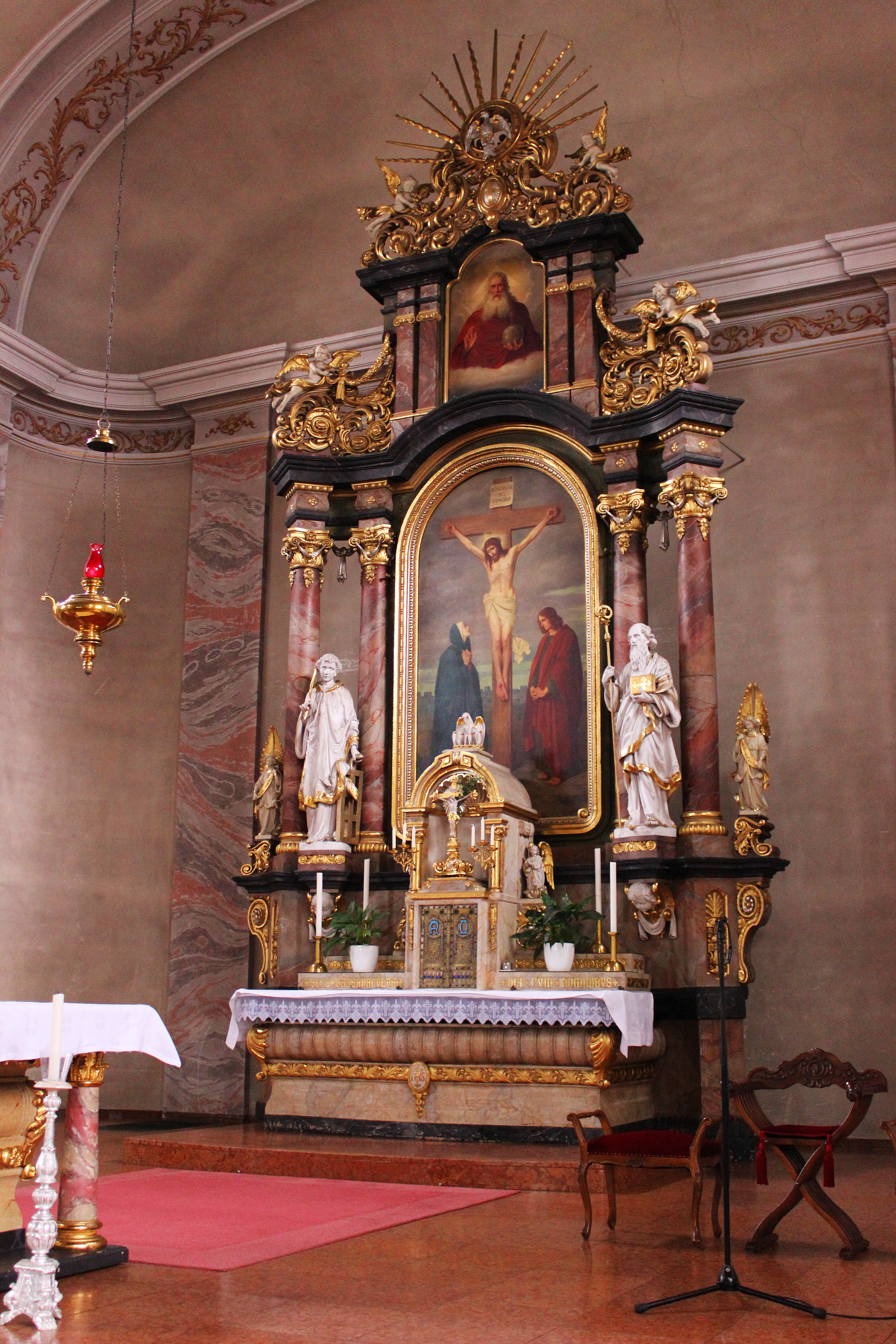 Hochaltar der katholischen Pfarrkirche St. Laurentius in Hülzweiler, einem Ortsteil der Gemeinde Schwalbach, Landkreis Saarlouis, Saarland